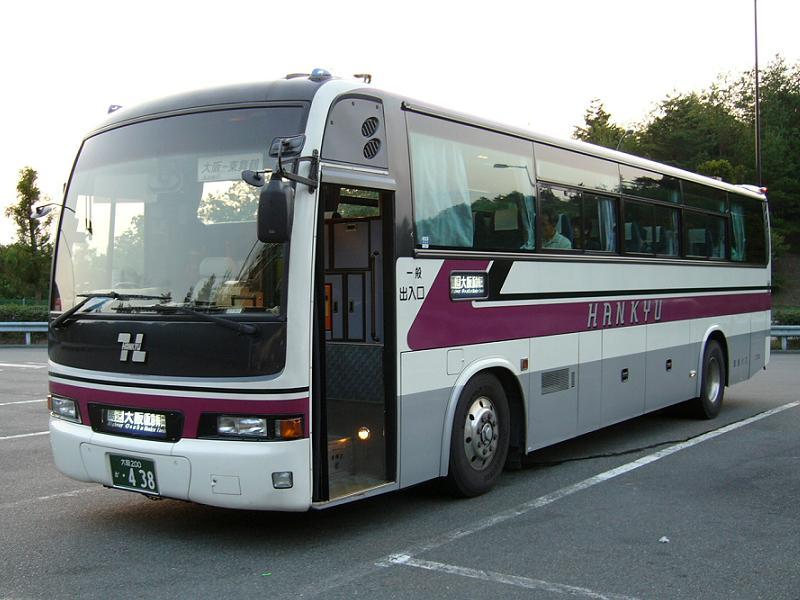 登録番号 大阪200か・438 阪急バス所属 車番2750 大阪～舞鶴線用 2005年9月17日 撮影